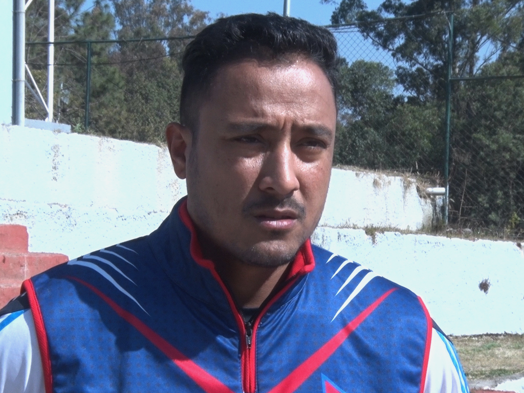 नेपाली: पारस खड्का नेपाली राष्ट्रिय क्रिकेट टिमका क्यापटेन